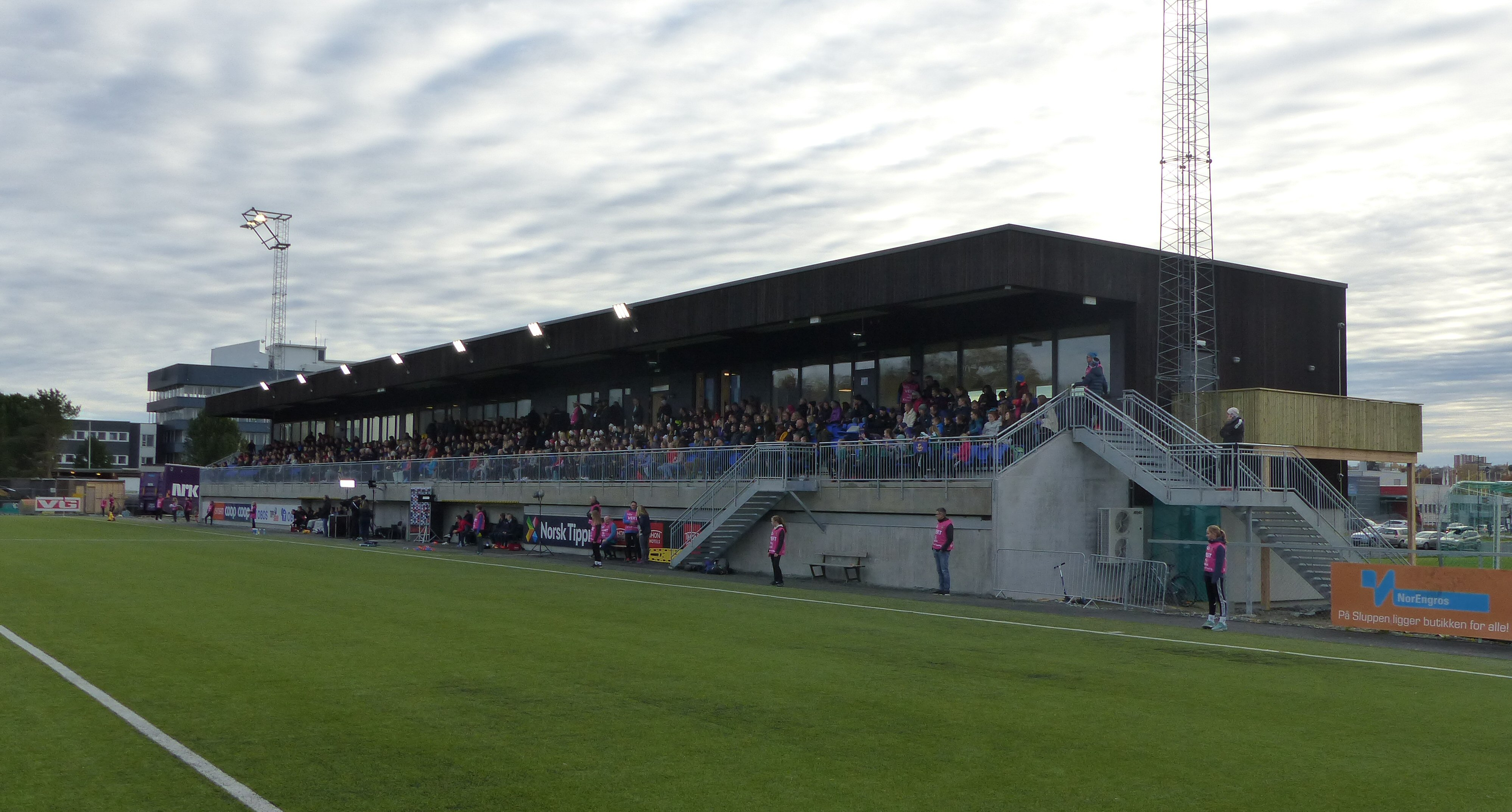 Fra innvielsen av Trondheims-Ørns hjemmebane Ørn Arena i 2018. Fra 2019 Koteng Arena.